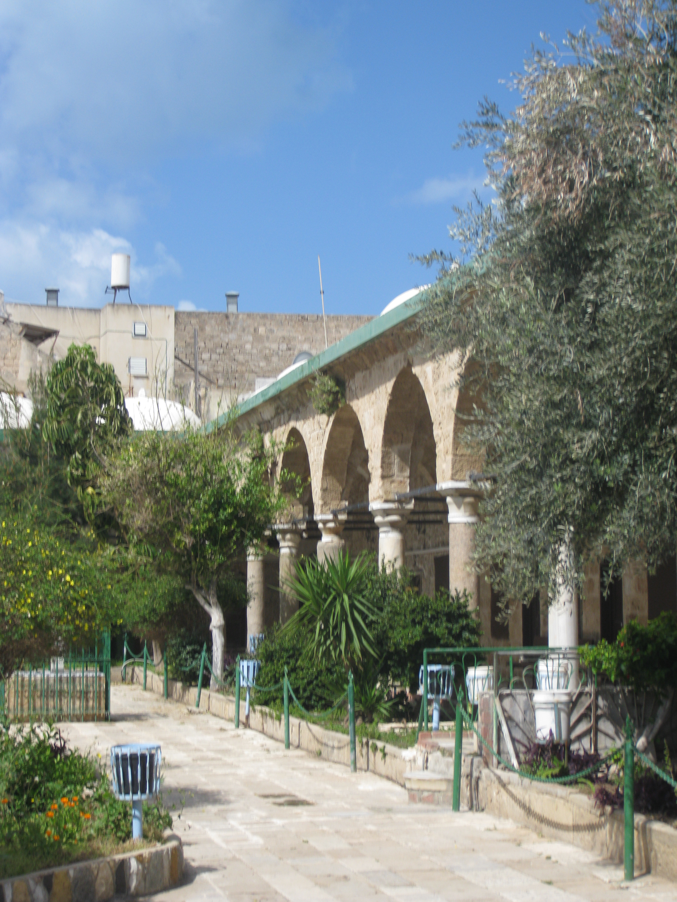 Al Jazar Mosque מסגד אל ג'זאר בעכו